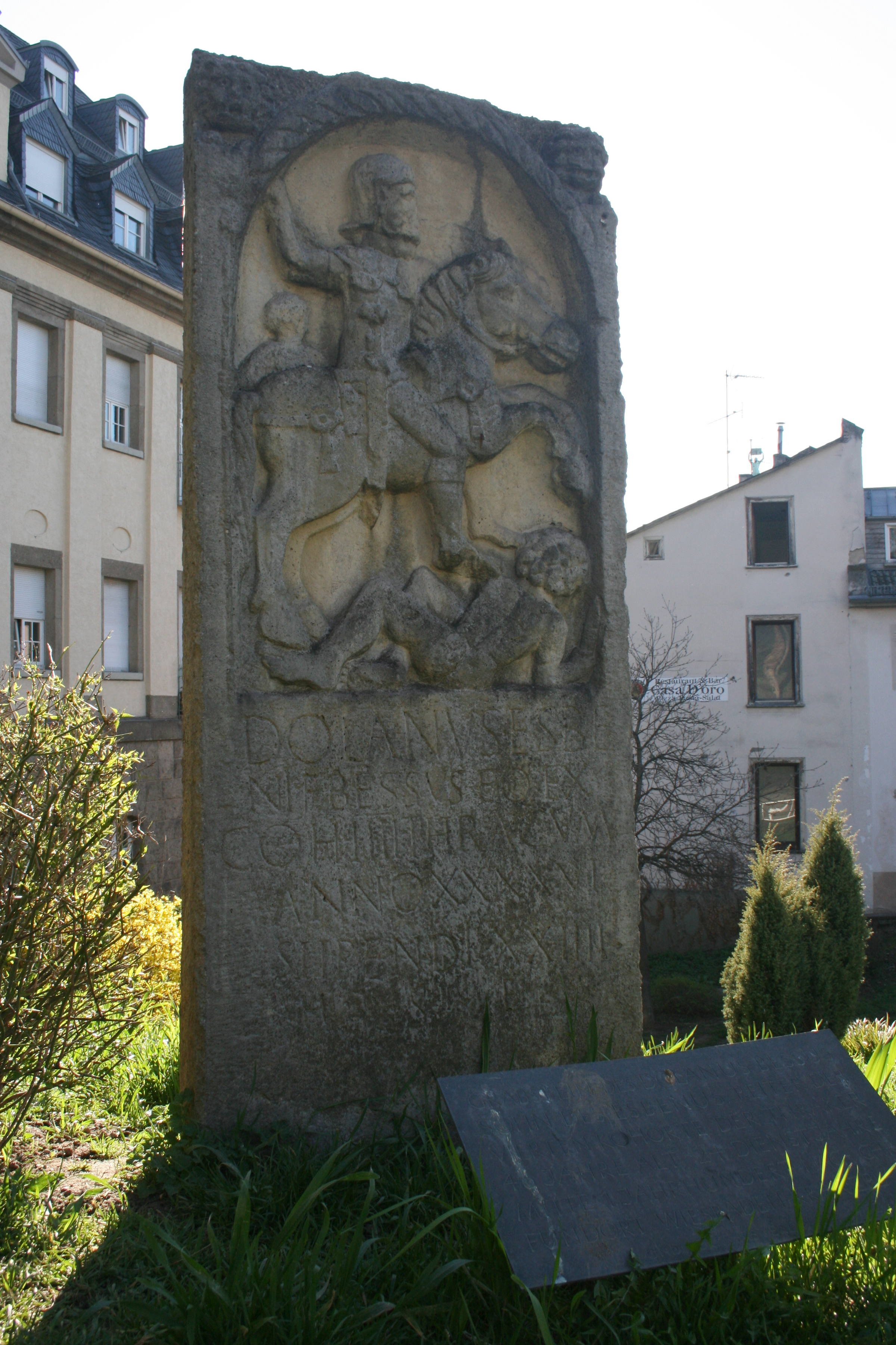 Replik des Soldatengrabsteins CIL XIII, 07585 (4, p 128) aus der Sammlung Nassauischer Altertümer. Aufstellung am Wiesbadener Römertor.